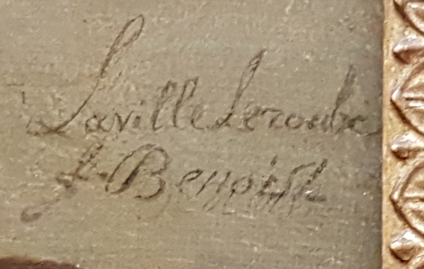 Portrait d'une négresse, ou Portrait d'une jeune femme noire, de Marie-Guillemine Benoist : détail (signature).